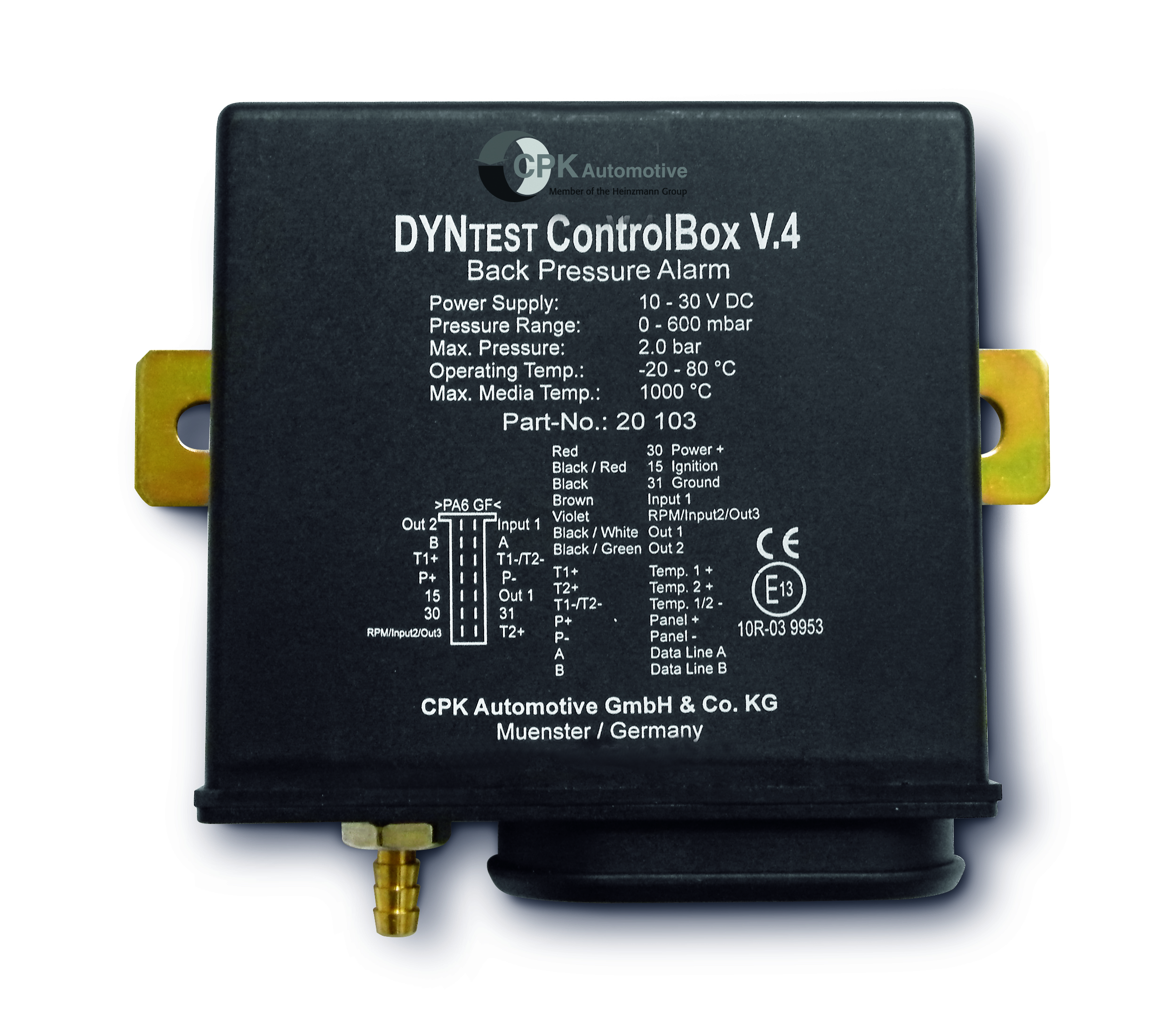 Datenlogger für die Überwachung von DPFs (z.B. Druck und Temperatur)